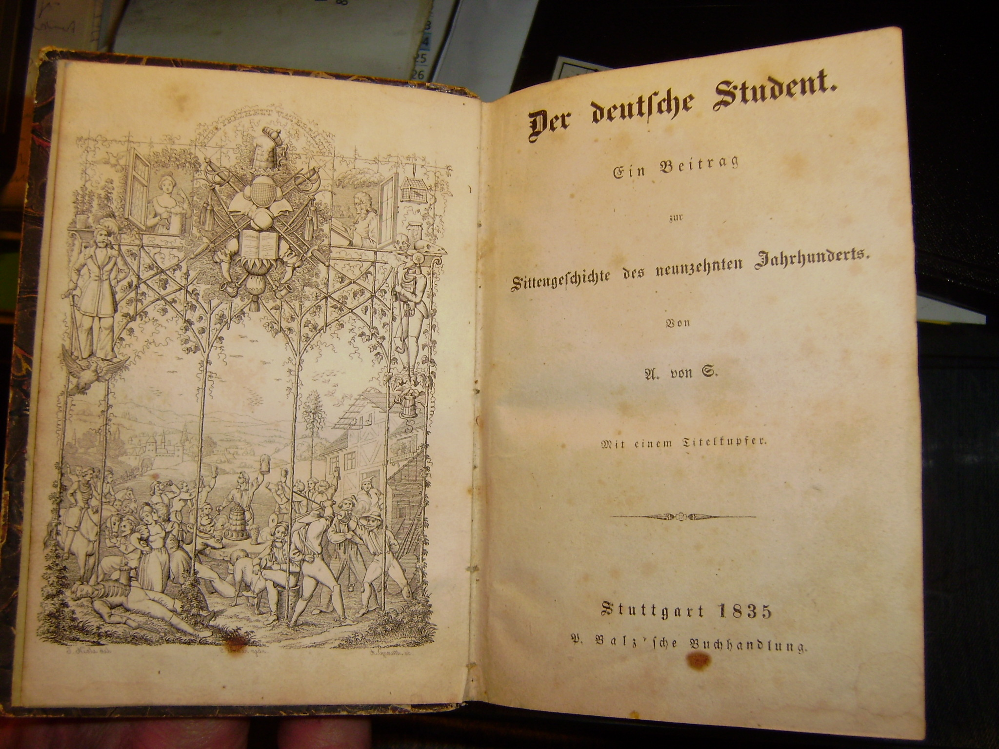 Fotografie des Schmutztitels von August Jäger (A. v. S.): Der deutsche Student. Stuttgart 1835